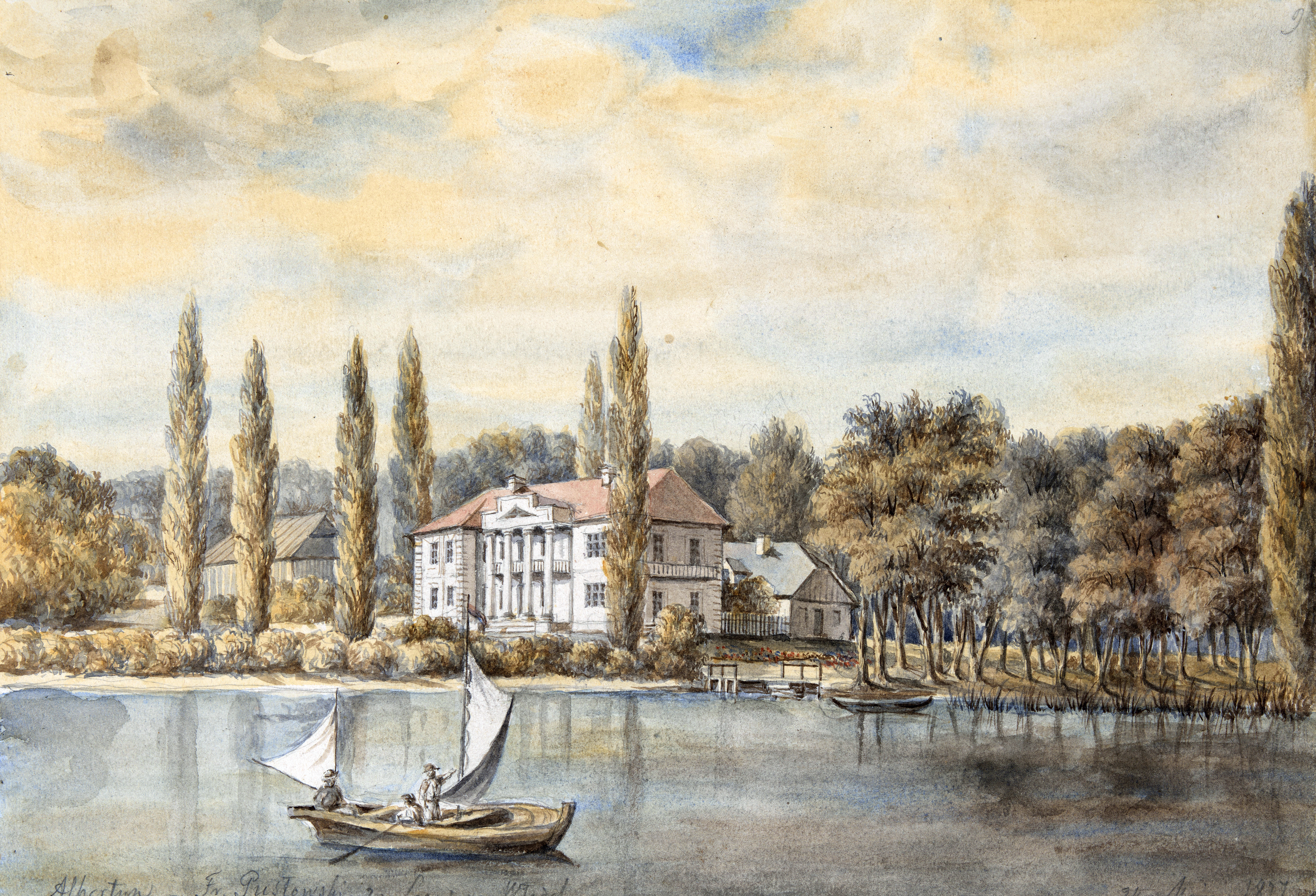 Беларуская (тарашкевіца): Слонім (Słonim), Альбэртын (Albertyn). Палацава-паркавы комплекс Пуслоўскіх (Pusłoŭski)